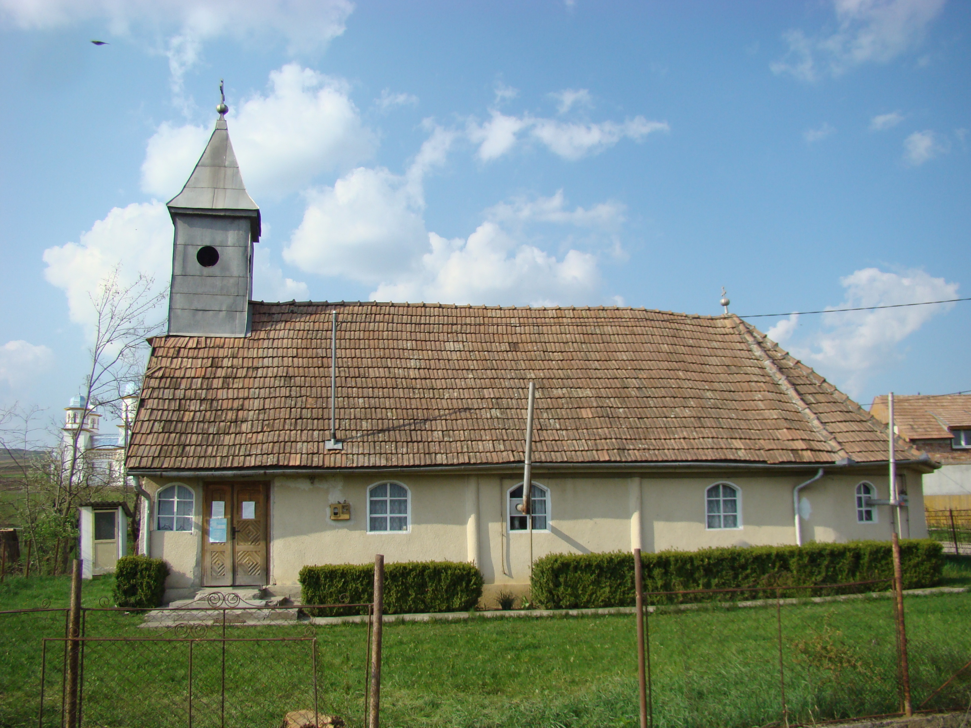 Biserica de lemn, sat aparţinător SFÂNTU GHEORGHE; oraş IERNUT